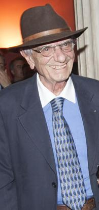 Γιάννης Παπαθανασίου